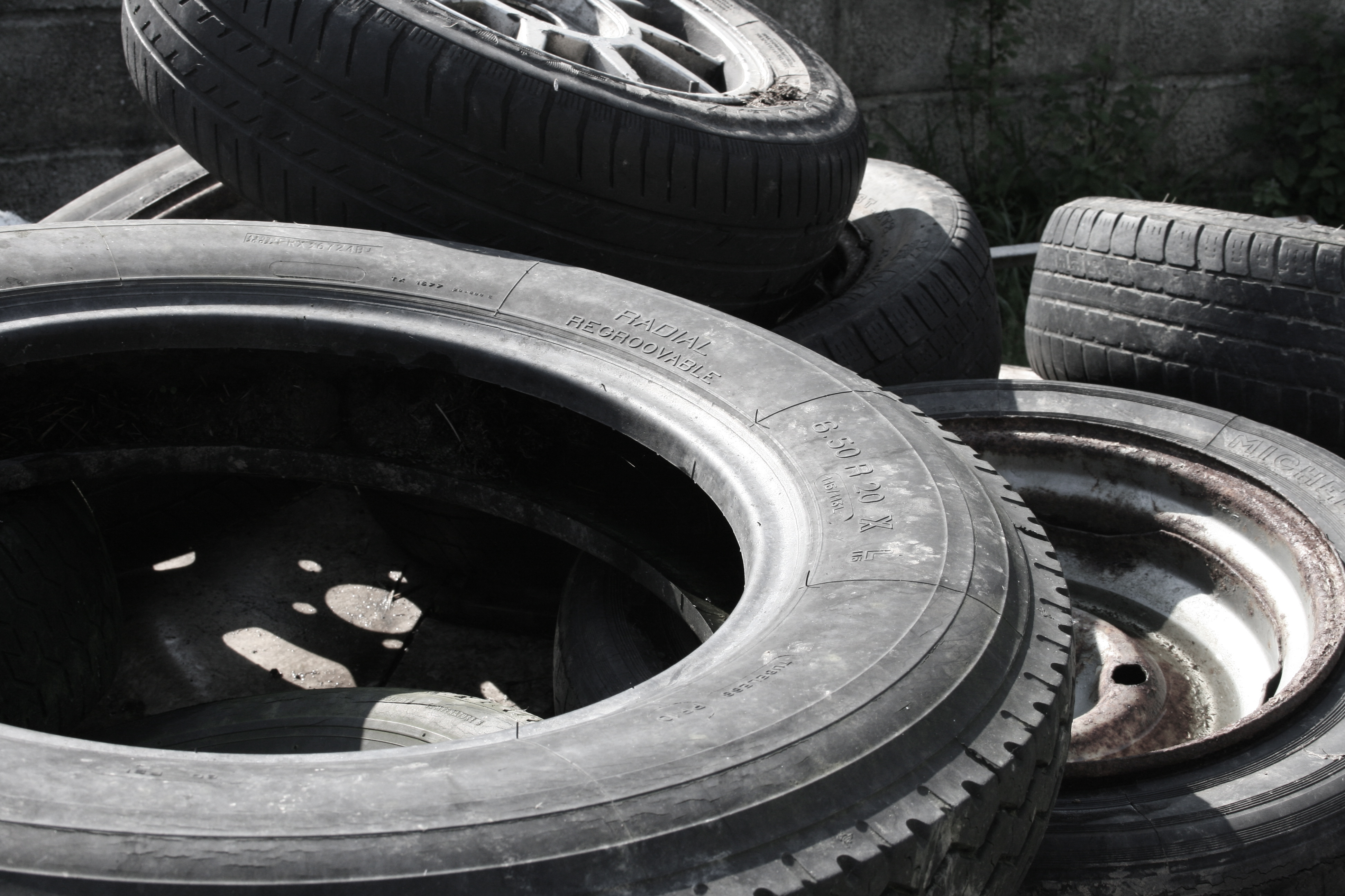 Wheels